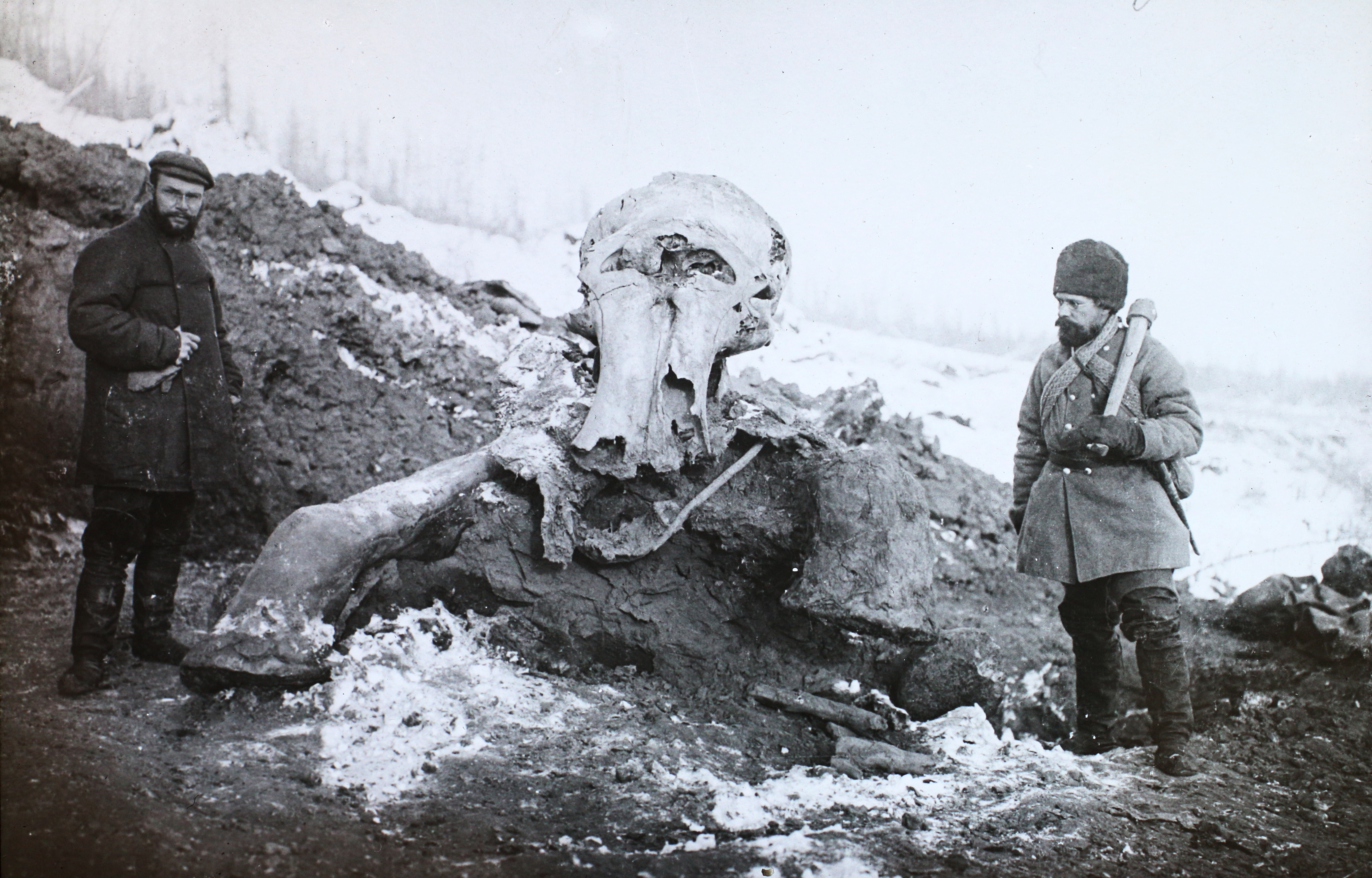 a Berezovka folyó völgye, mamutlelet. Balra a lelet felfedezője, Eugene W. Pfitzenmayer régész. Location: Russia Tags: skeleton, mammoth Title: a Berezovka folyó völgye, mamutlelet. Balra a lelet felfedezője, Eugene W. Pfitzenmayer régész.